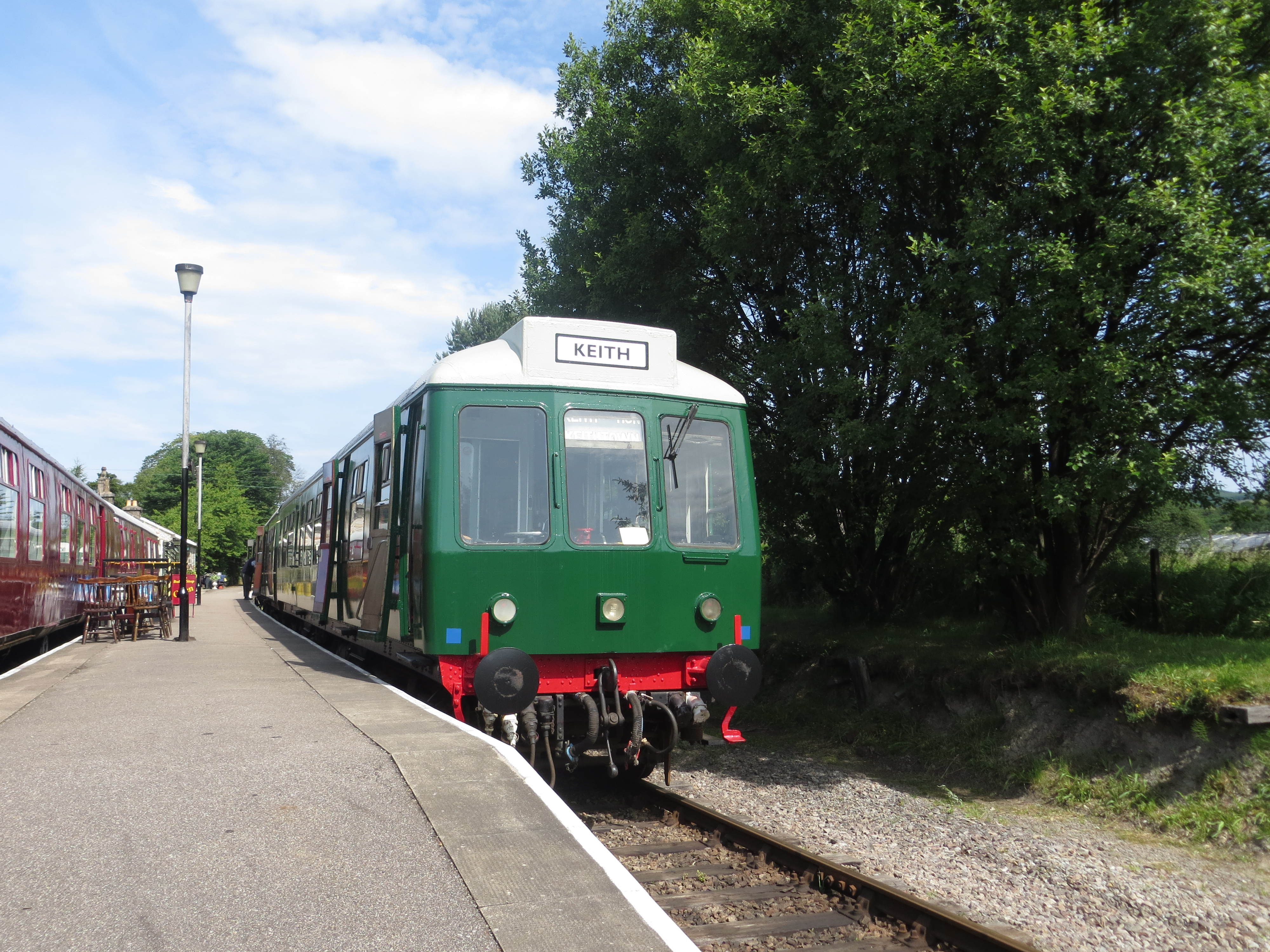 Keith and Dufftown Railway, British Rail Class 108 im Bahnhof Dufftown, 2013